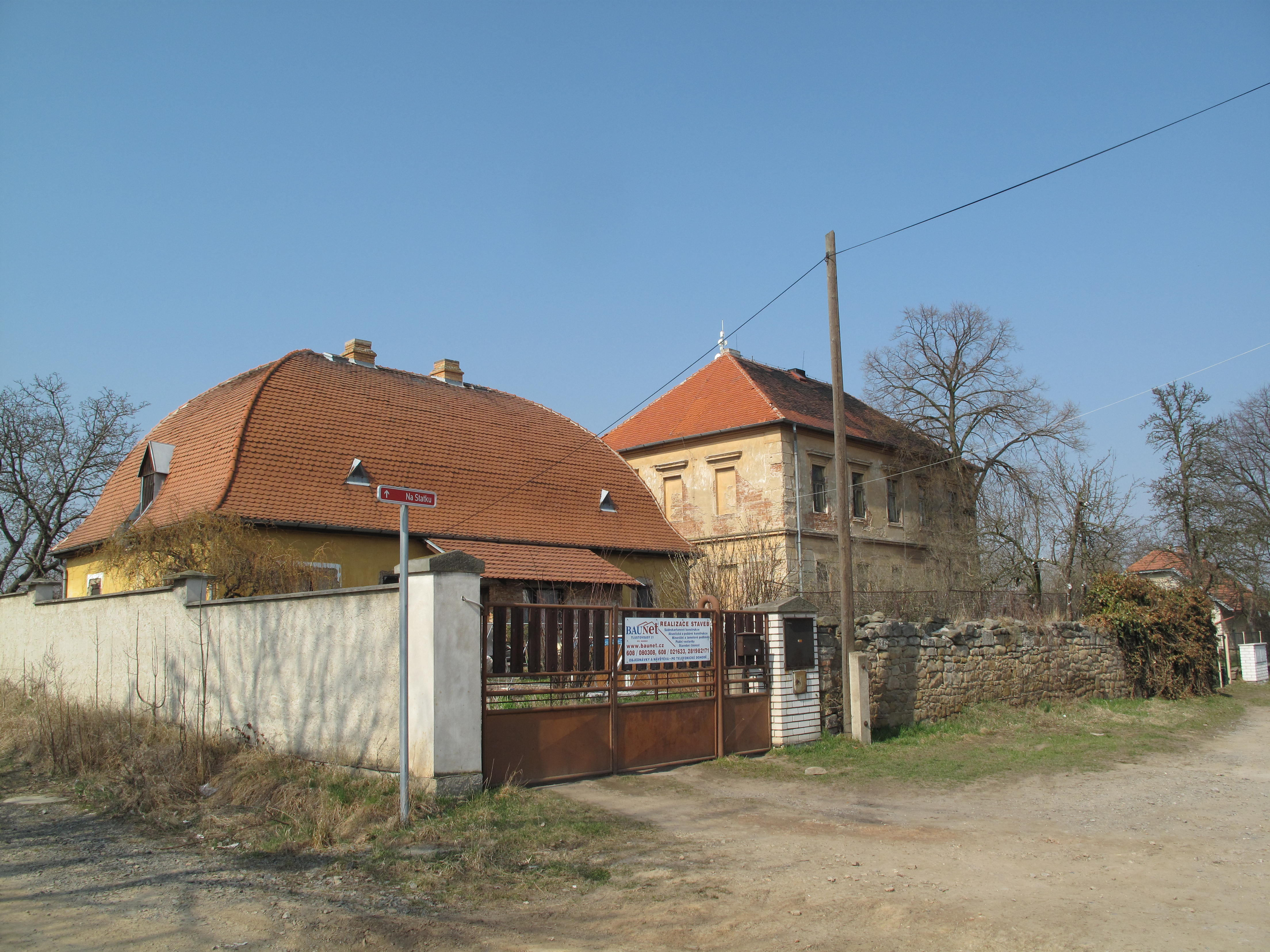 Tlustovousy, domy čp. 21 a 29 v ulici Ke Skalce.